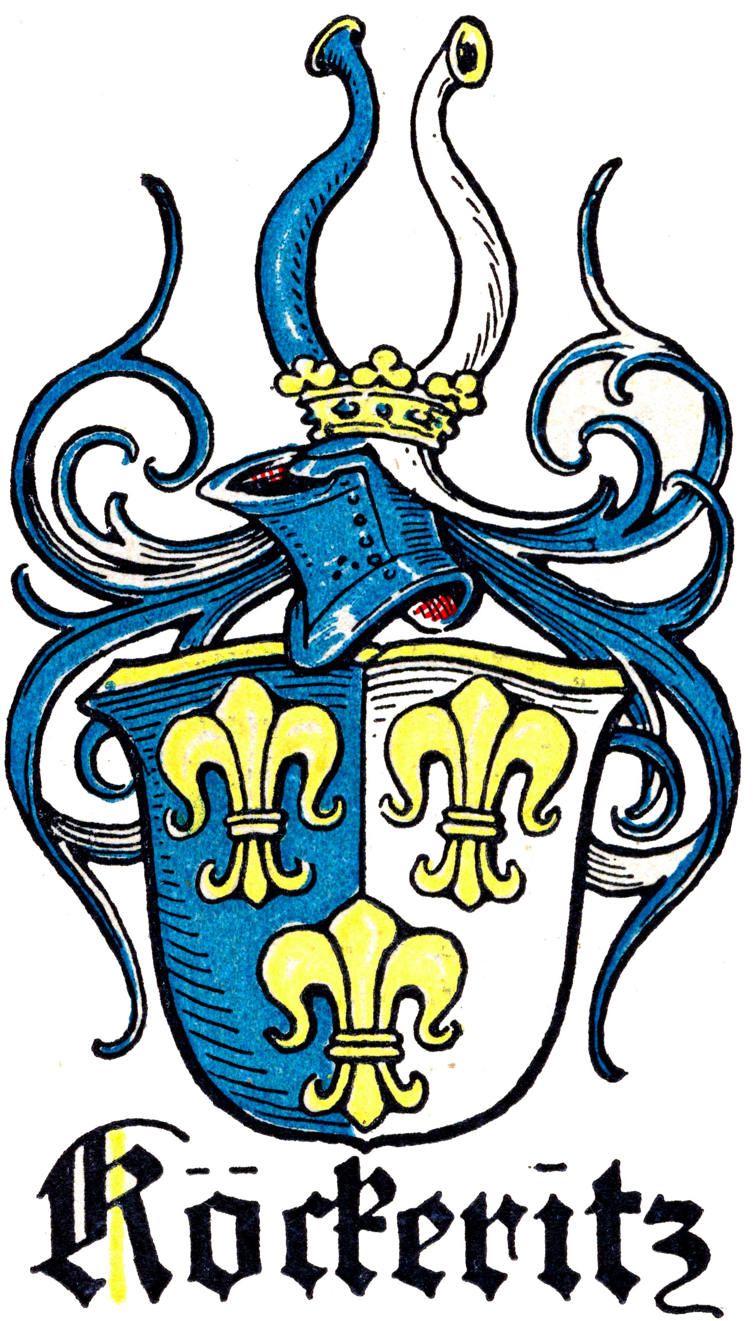 Wappen derer von Köckritz